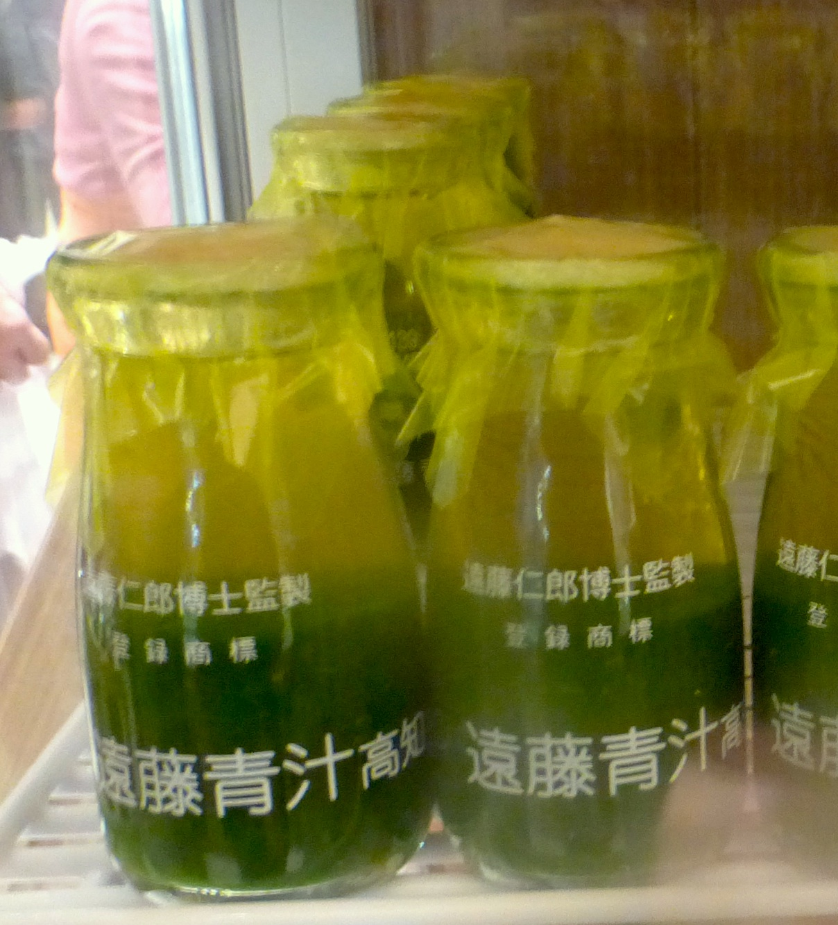 Aojiru bottles (青汁の瓶)